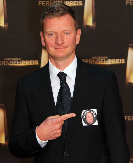 Michael Kessler beim Deutschen Fernsehpreis 2012